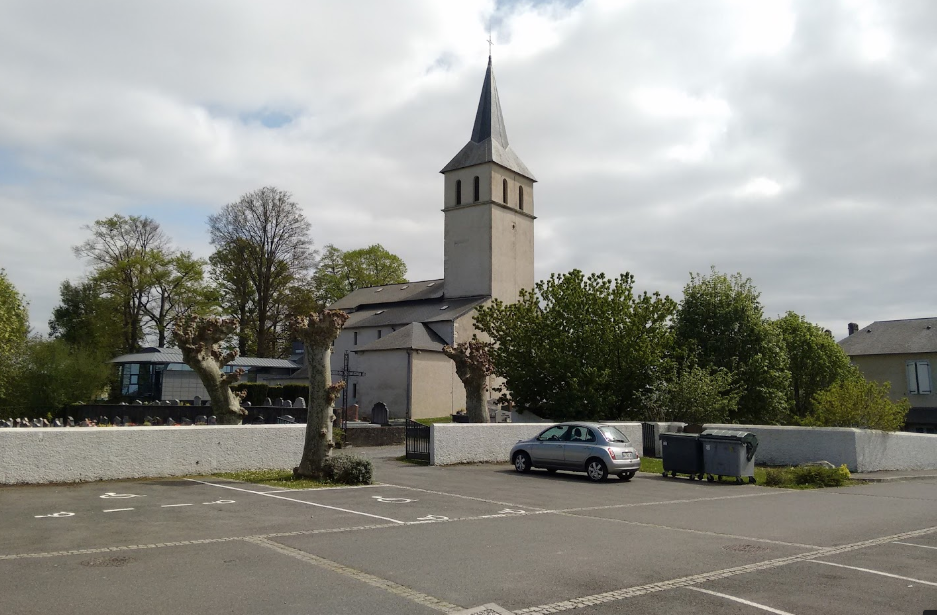 Église Saint-Julien de Serres-Castet